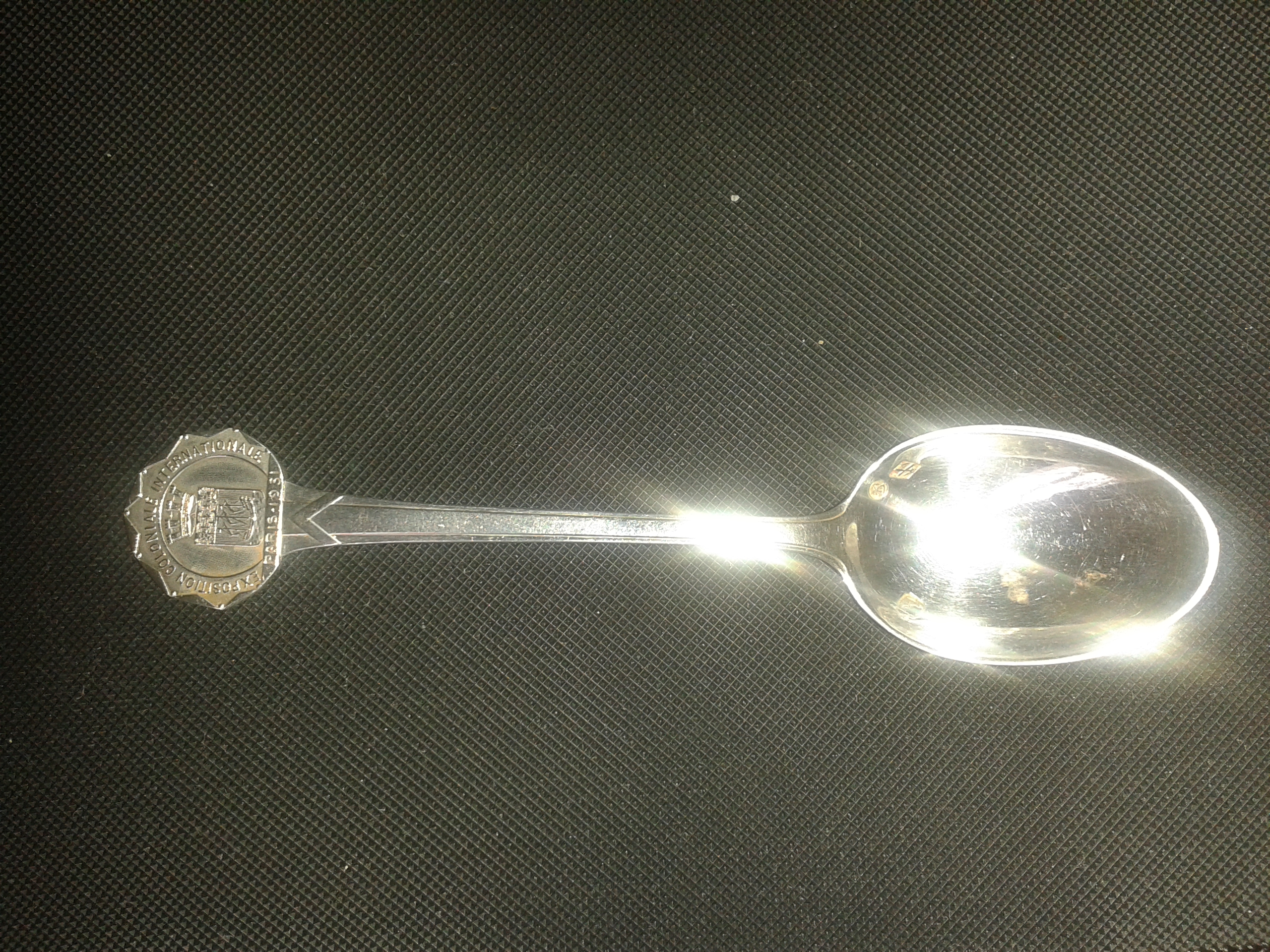 Petite cuillère souvenir de l'Exposition Coloniale Internationale - Paris - 1931